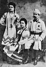 І. Буйніцкі